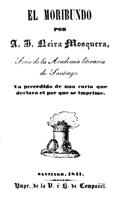 El Moribundo